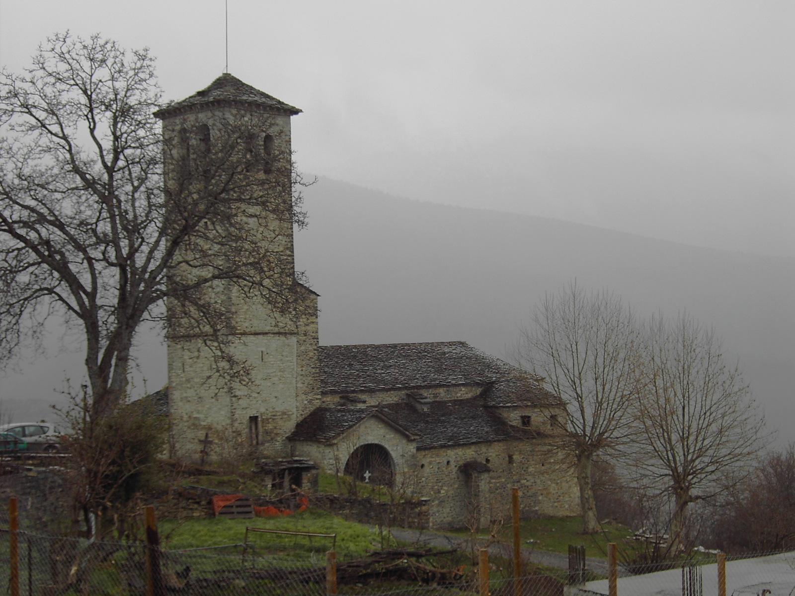 Iglesia de Fanlo, en la comarca oscense de Sobrarbe, vista bajo la ventisca. Aguanieve en Abril; se cumple el dicho local "En Fanlo, la nieve de octubre a mayo".